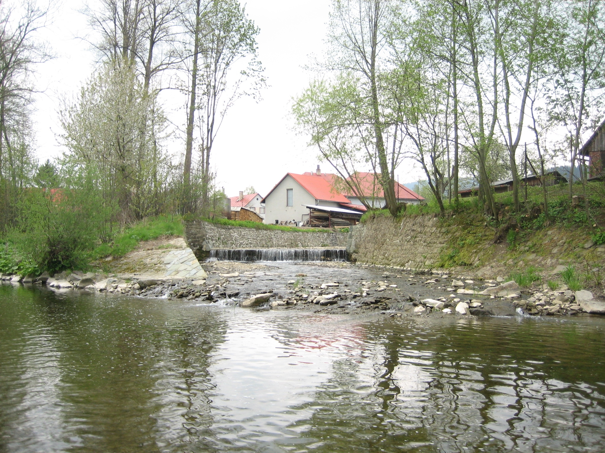 Ústí potoka Zděchovka do Vsetínské Bečvy v obci Huslenky